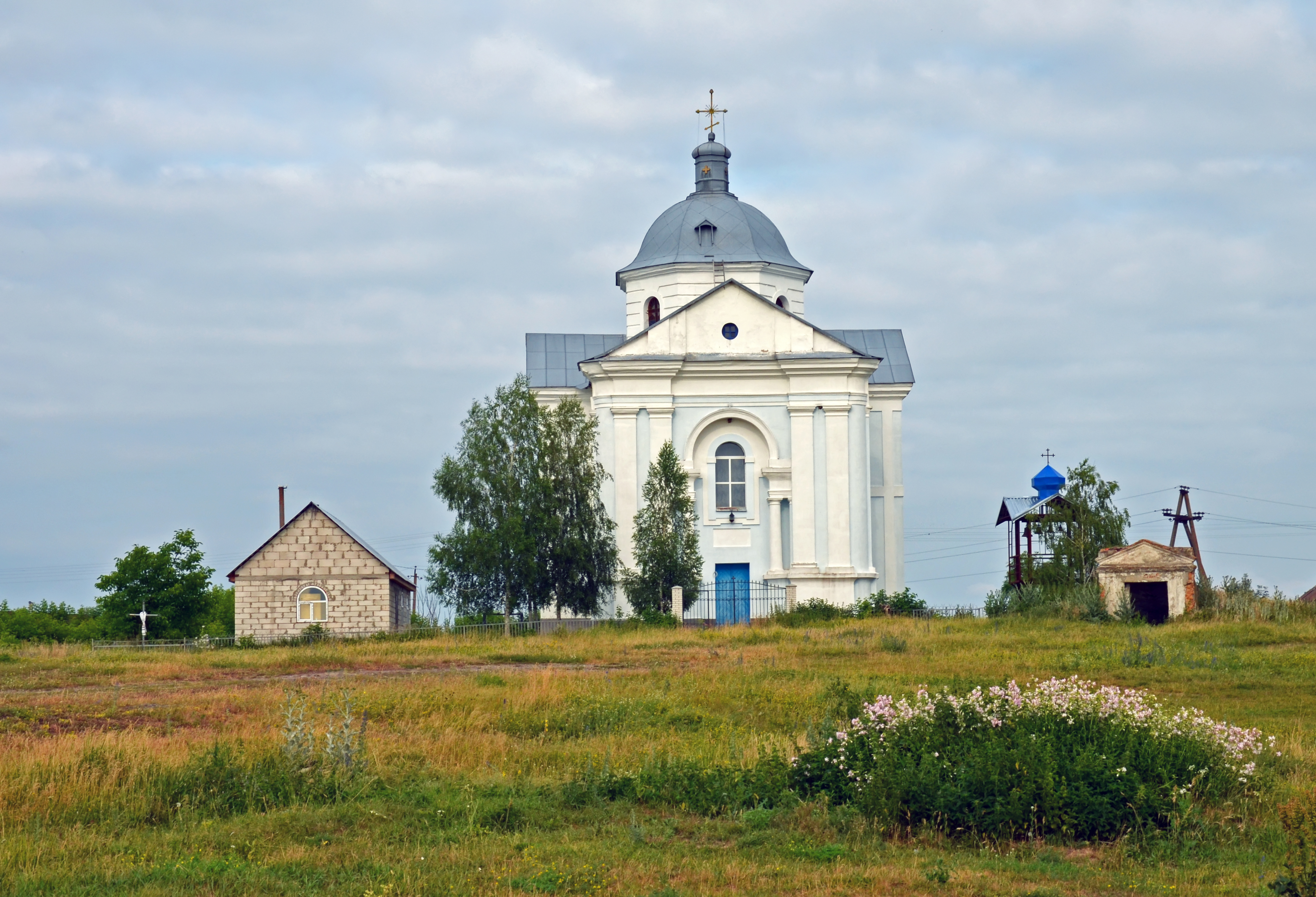 Церква Св.Богородиці, с.Іванків